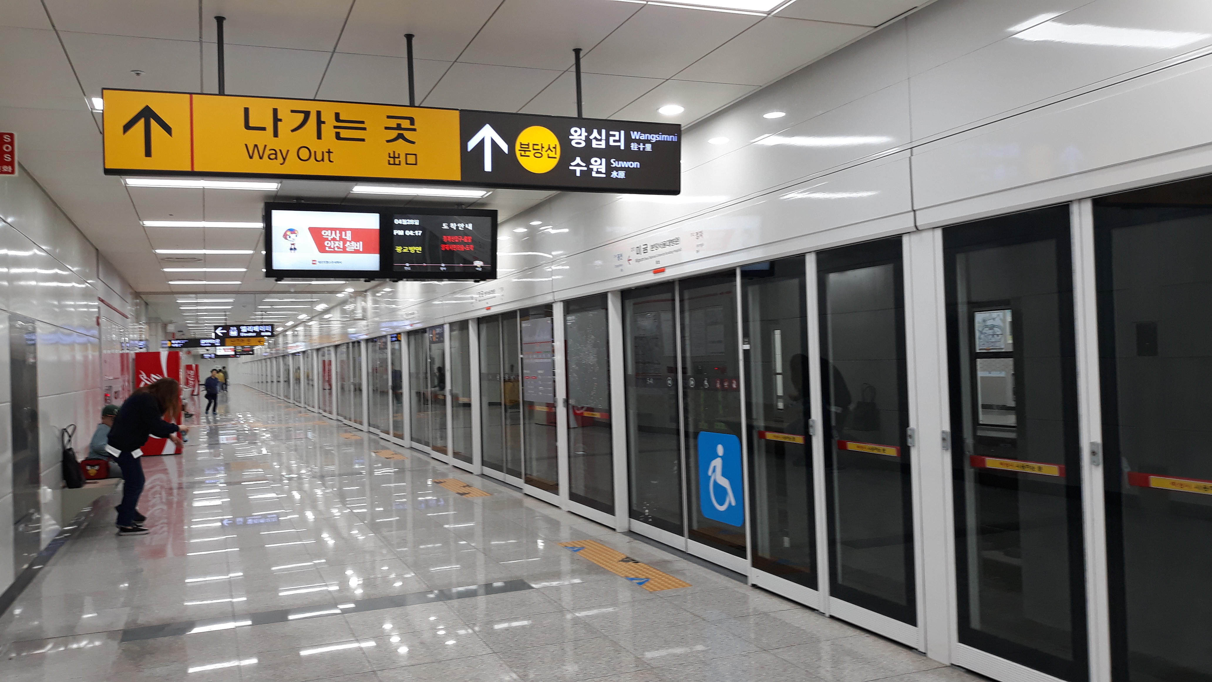 新盆唐線の美金駅乗り場の写真